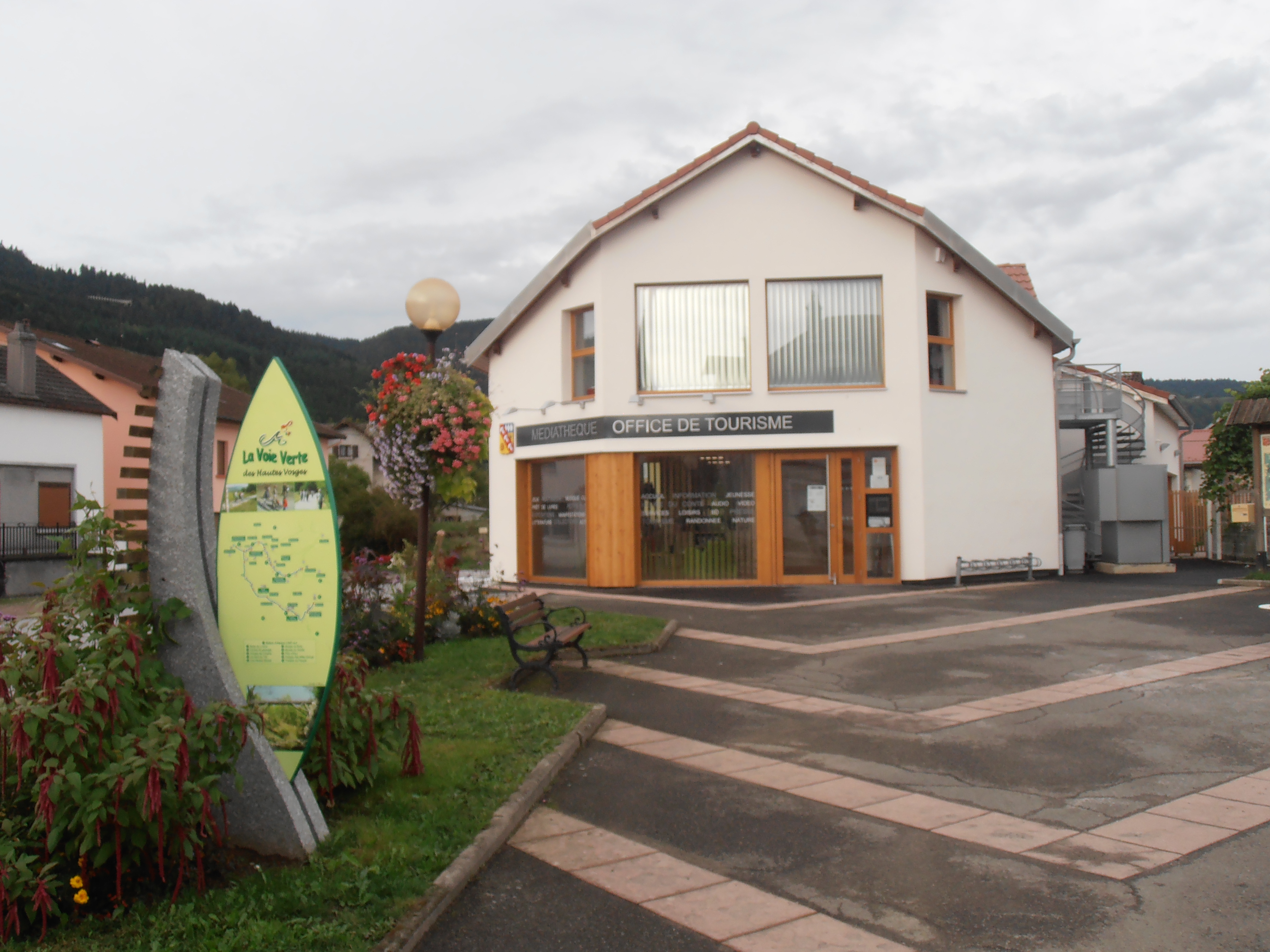 Vosges, Saulxures-sur-Moselotte, Un office de tourisme entièrement réaménagé et modernisé : médiathèque, bibliothèque, informatique... inauguré le 02 octobre 2015